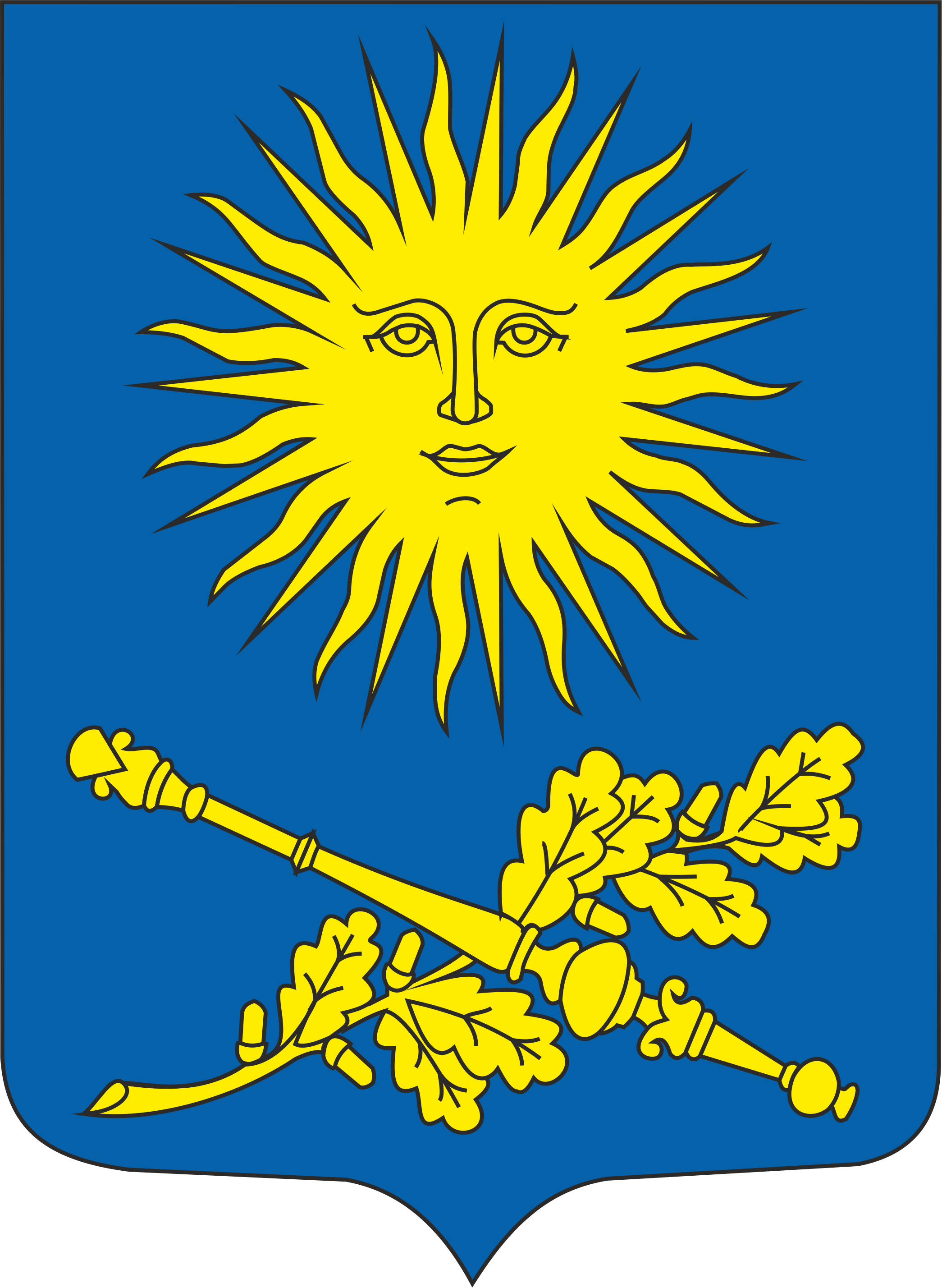 Герб БГПУ